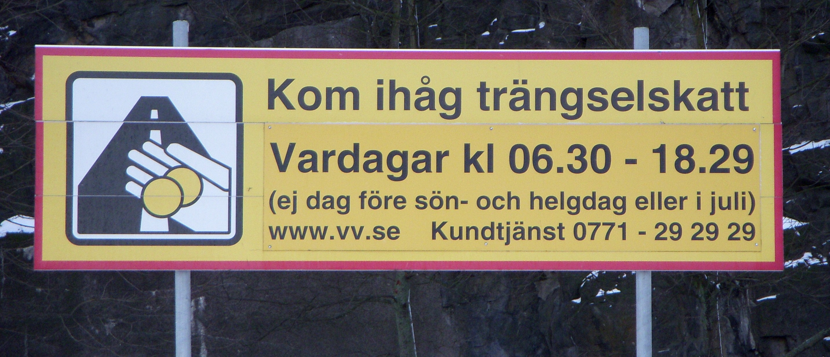 Påminnelseskylt om trängselskatten vid Vikingterminalen i Stockholm